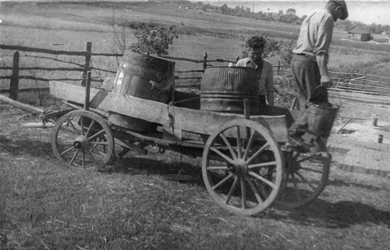 Wóz konny o drewnianych kołach stosowany na wsi na budowie (Nowe Strzałki, woj. mazowieckie, okres powojenny).